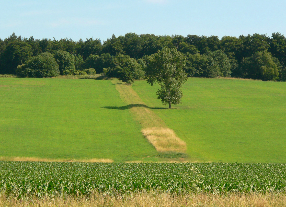 Gelände der Reichserntedankfeste am Bückeberg mit "Führerweg"